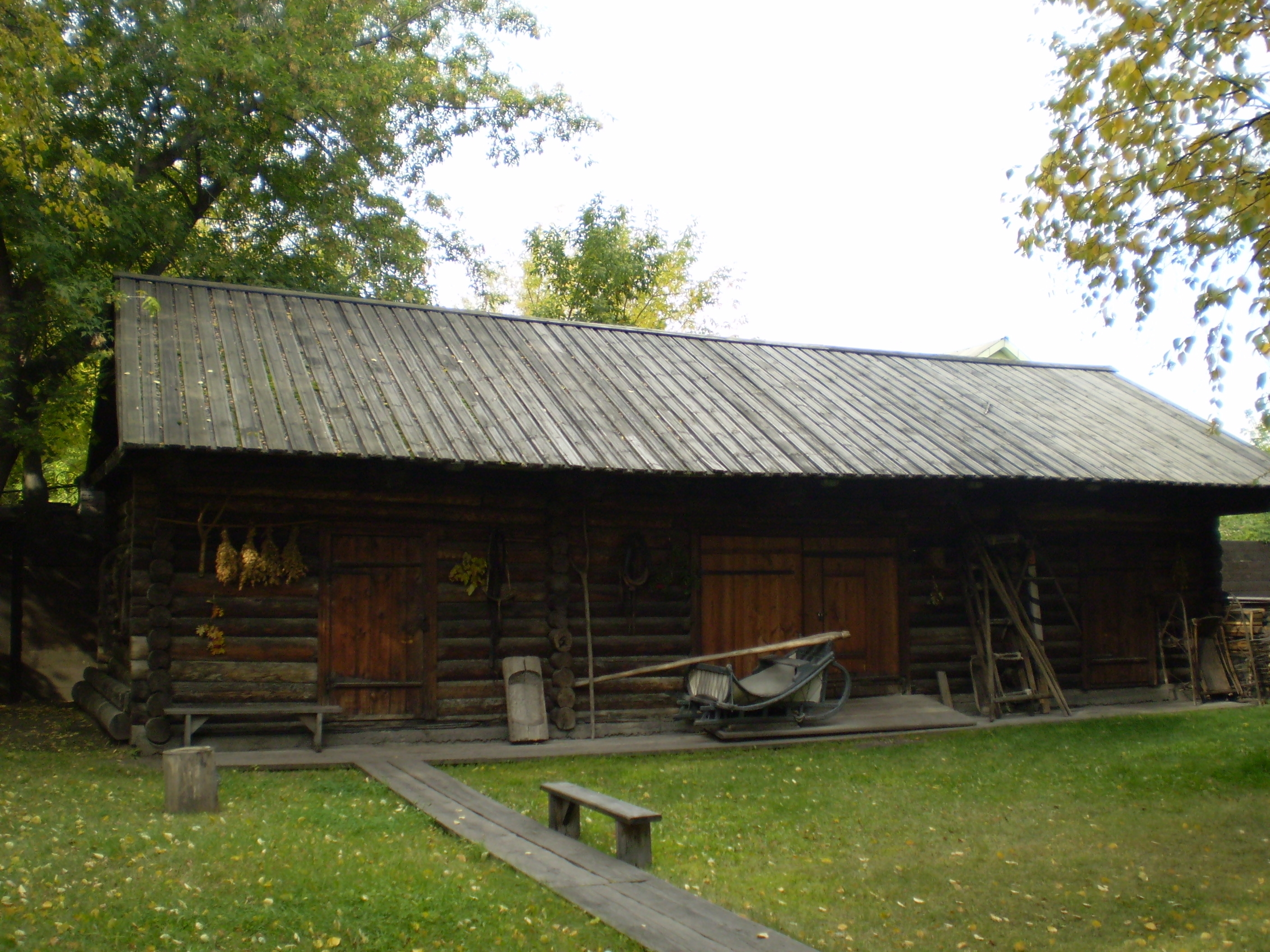 Музей-усадьба Суриковых в Красноярске. Завозня.